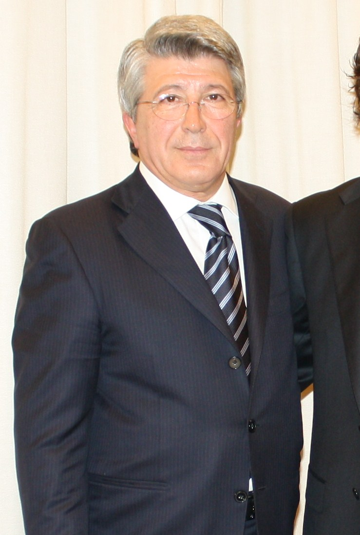 Enrique Cerezo tras impartir una conferencia en el Colegio Mayor Elías Ahúja de Madrid.